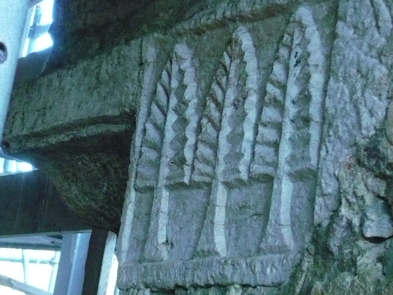 Igreja de São Gião da Nazaré - obras de restauro